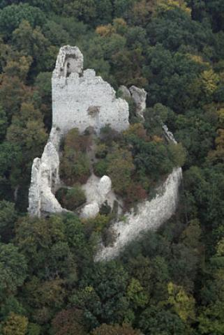 Vértessomló -castle: Vitányvár, Hungary, aerialphotography